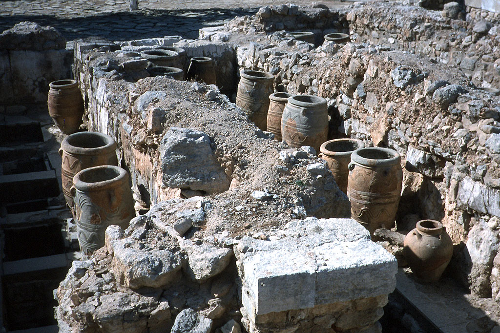 Magazin mit Tongefäßen in Knossos